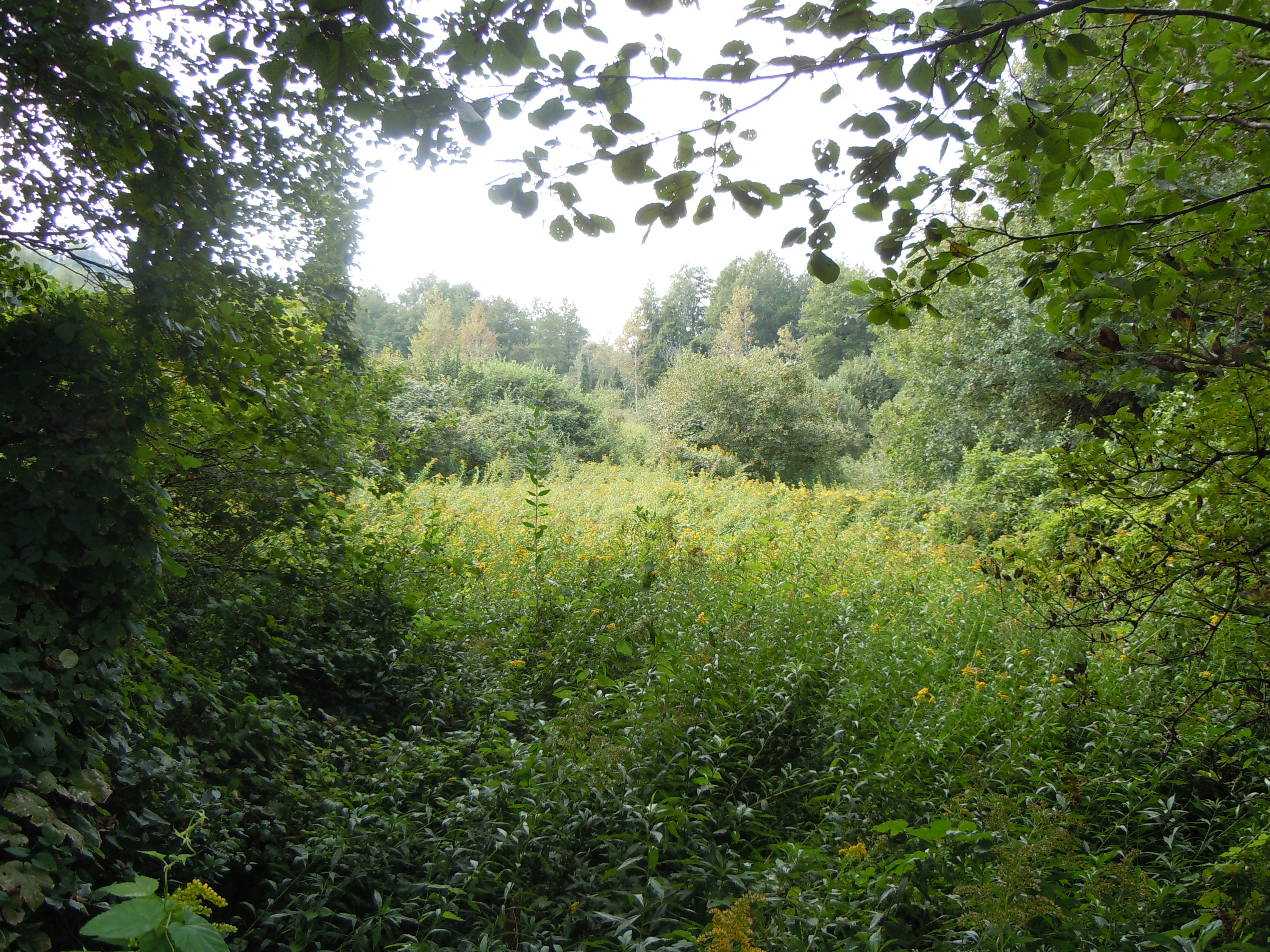 Le saut du Loup - Corbelin (Isère) - France